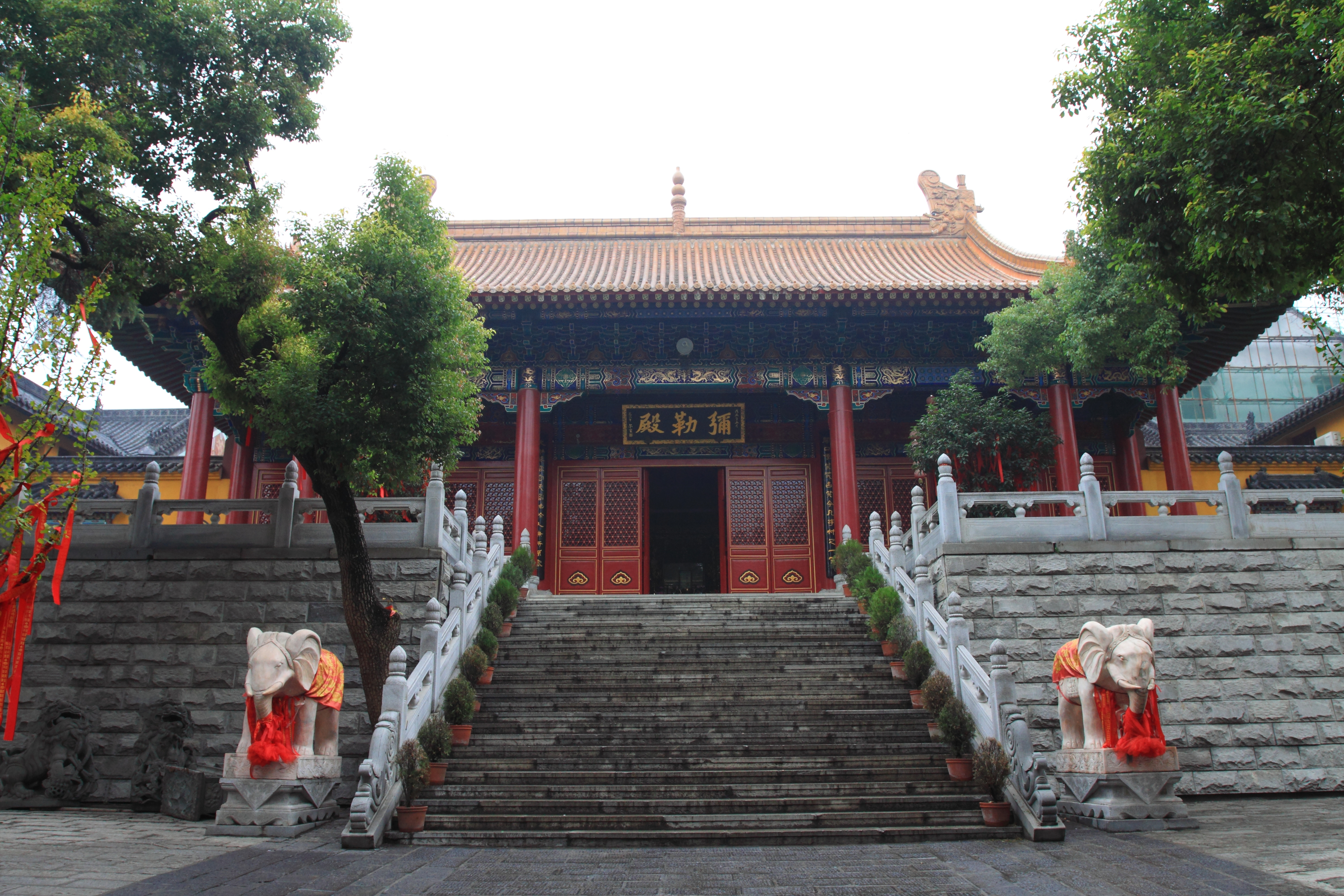 武汉市武昌区宝通寺 —— 弥勒殿